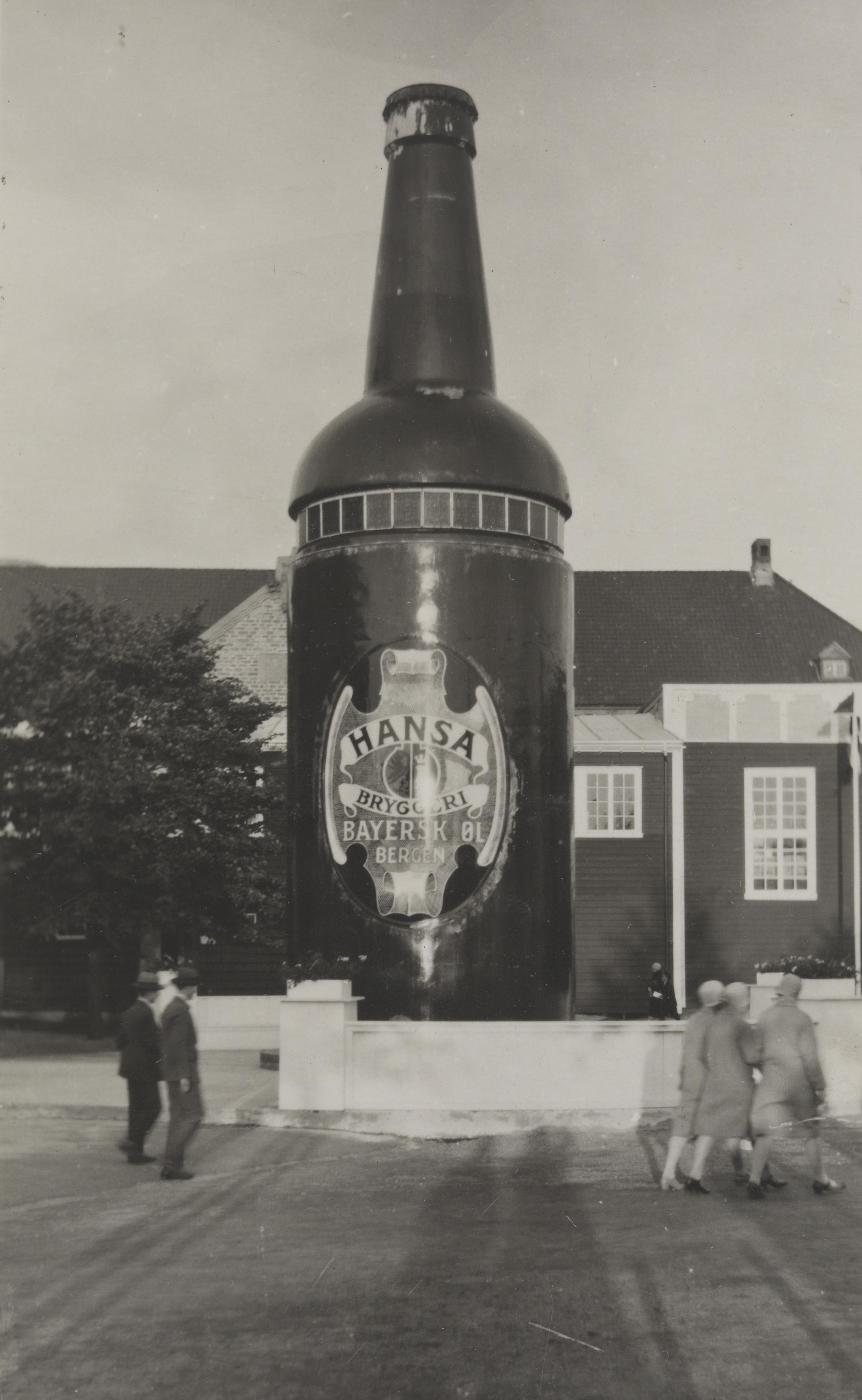 Bildet er hentet fra Nasjonalbibliotekets bildesamling Byparken, Bergen, Hordaland